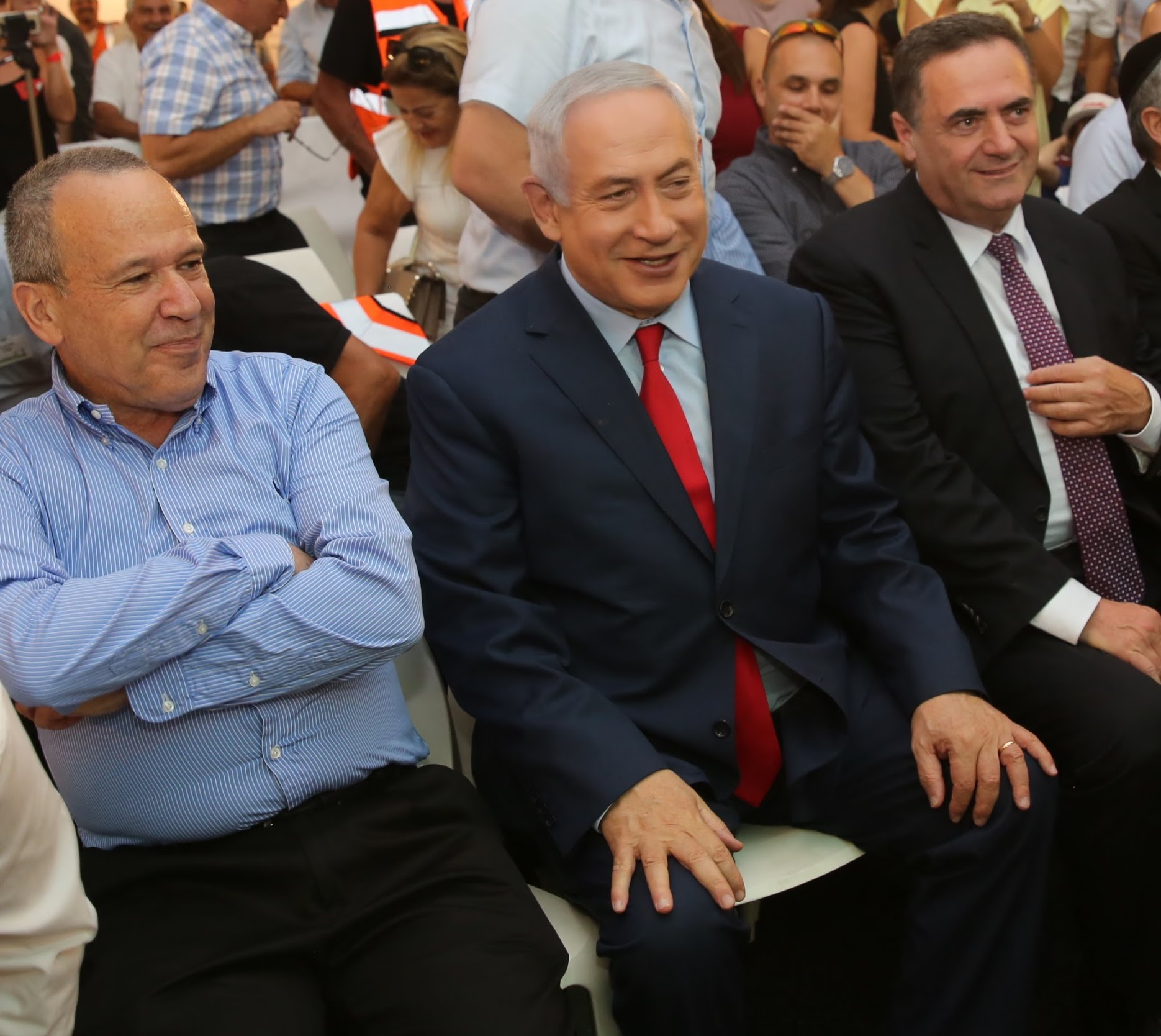 טקס חנוכת מסילת השרון - שר התחבורה ישראל כץ, ראש הממשלה נתניהו ויור דירקטוריון נתיבי ישראל עודד שמיר